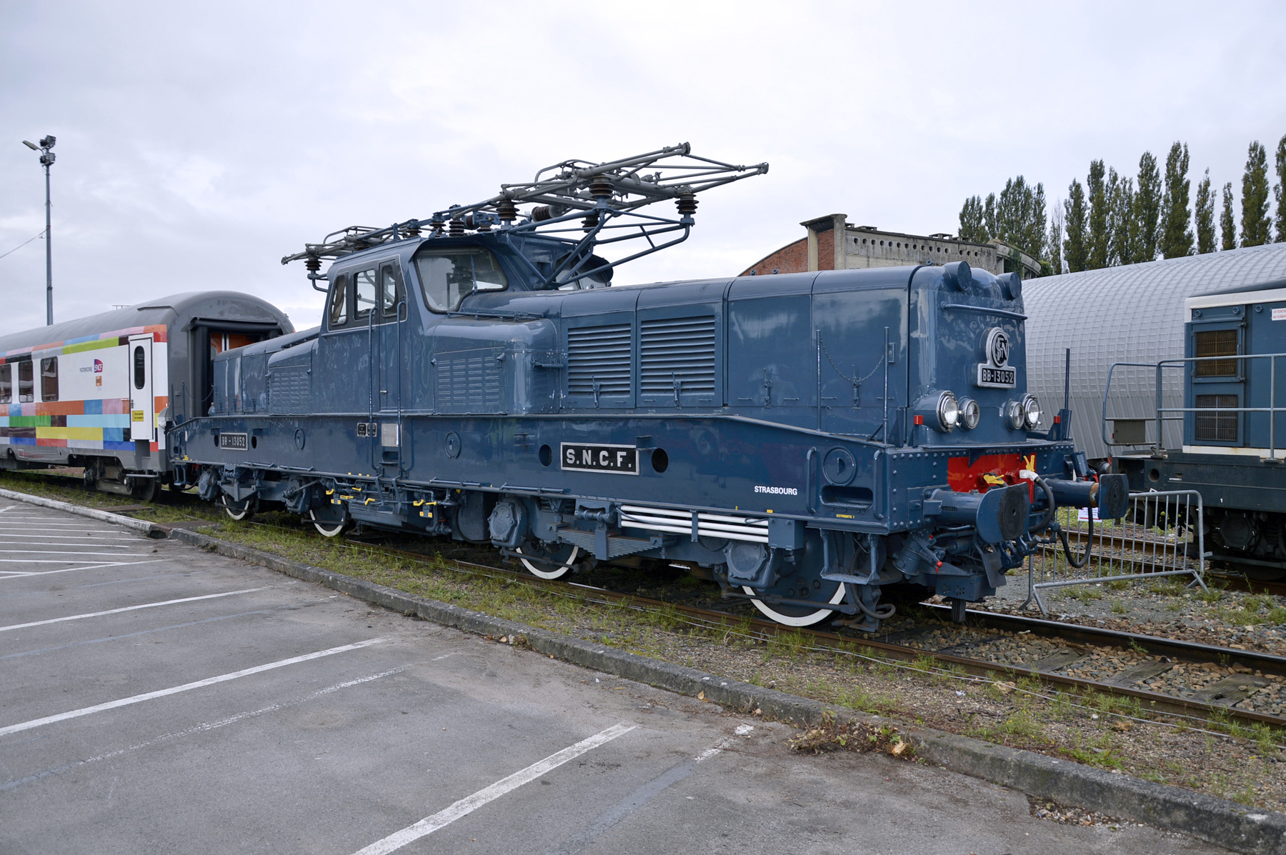 BB 13052 de la cité du train à Longueau